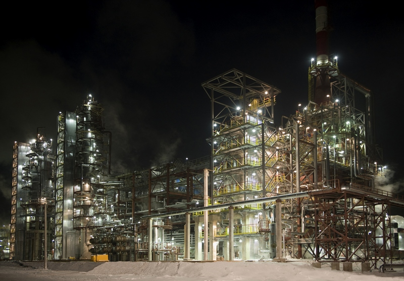 Висбрекинг